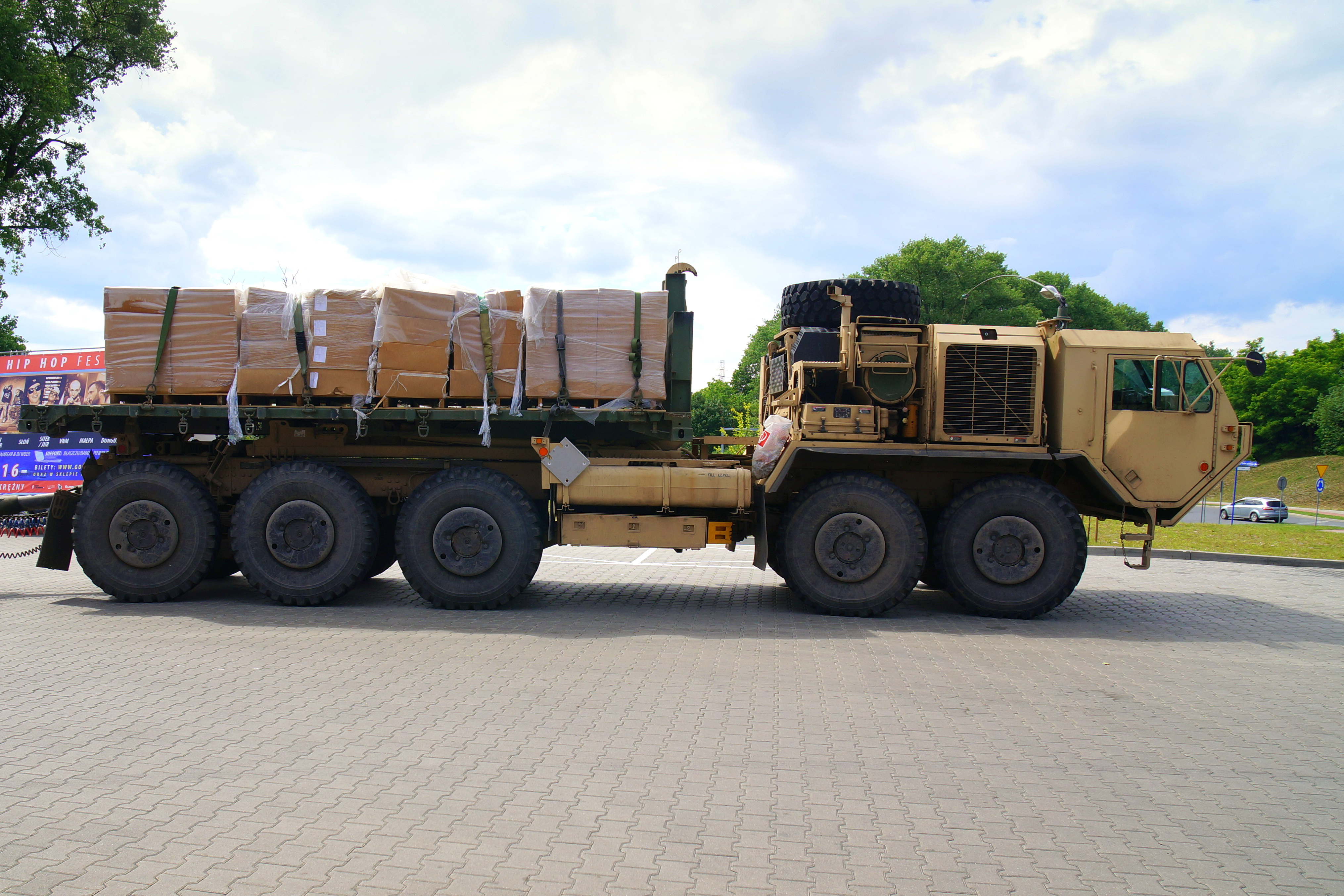 Manewry "Anakonda-16" - ciężki wojskowy samochód ciężarowy Oshkosh PLS armii amerykańskiej w Gorzowie Wlkp.